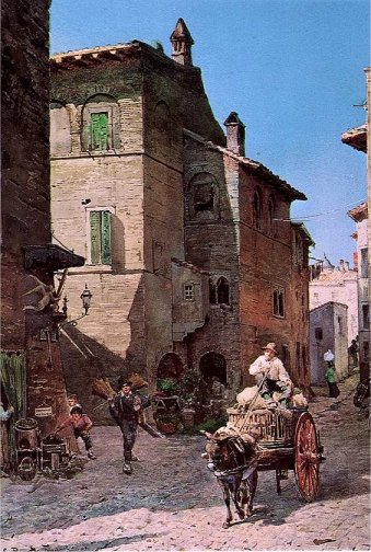 Vecchie Case a via della Lungaretta in Rome (rione Trastevere)